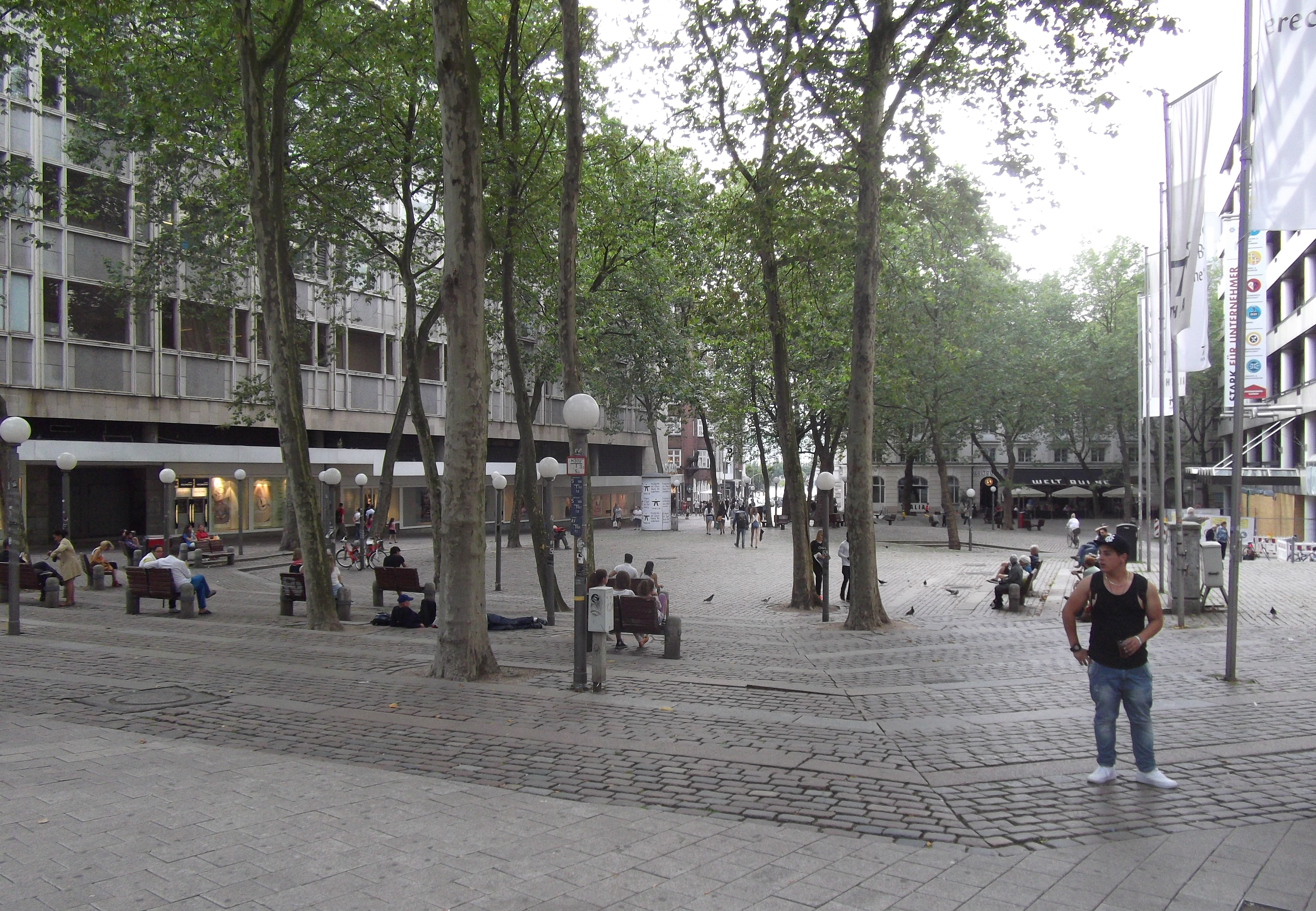 Hamburg Gerhart-Hauptmann-Platz